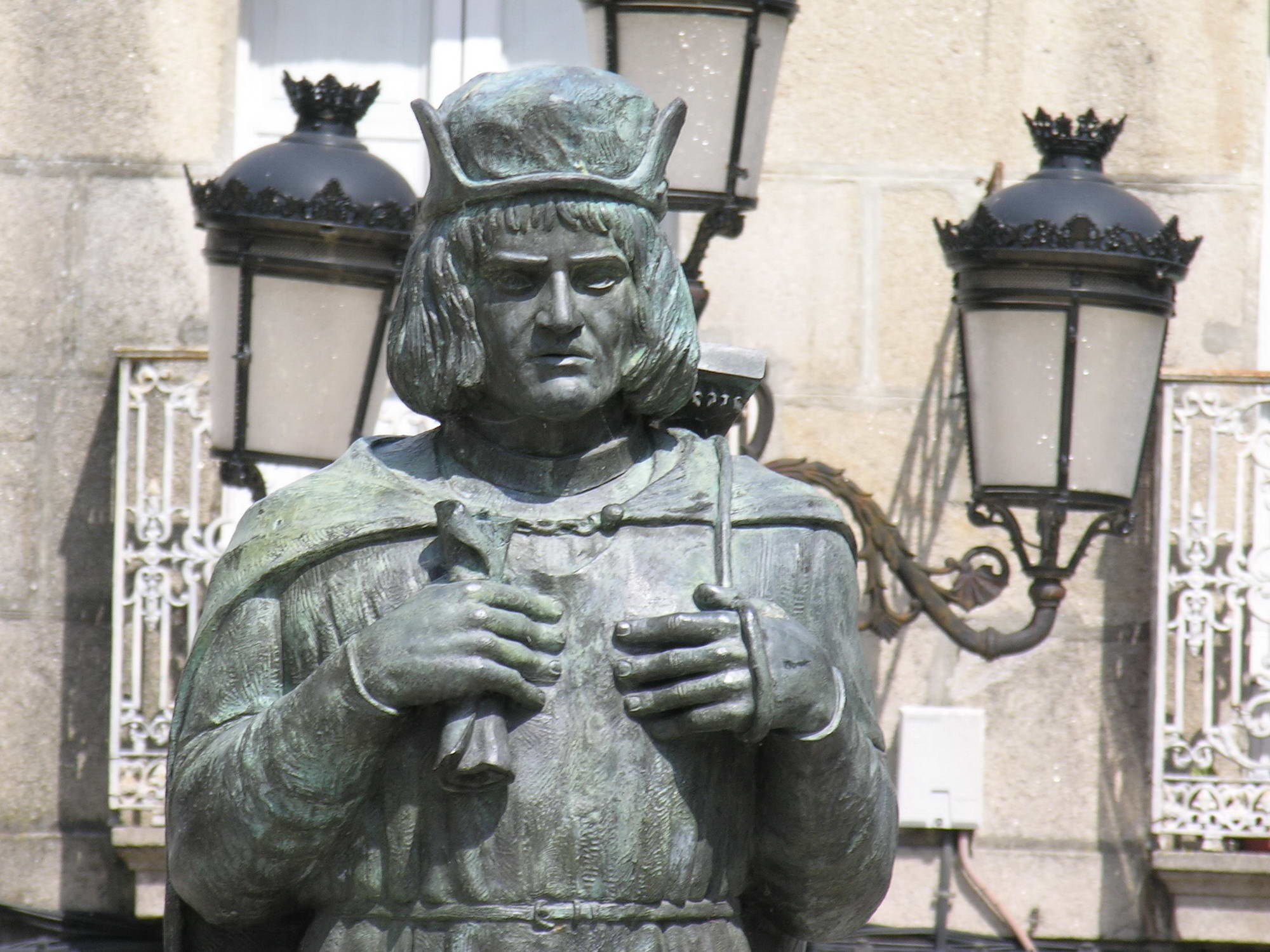 Macías o namorado, Padrón, Galicia. Escultura de Ramón Conde. Publish by= Luis Miguel Bugallo Sánchez.